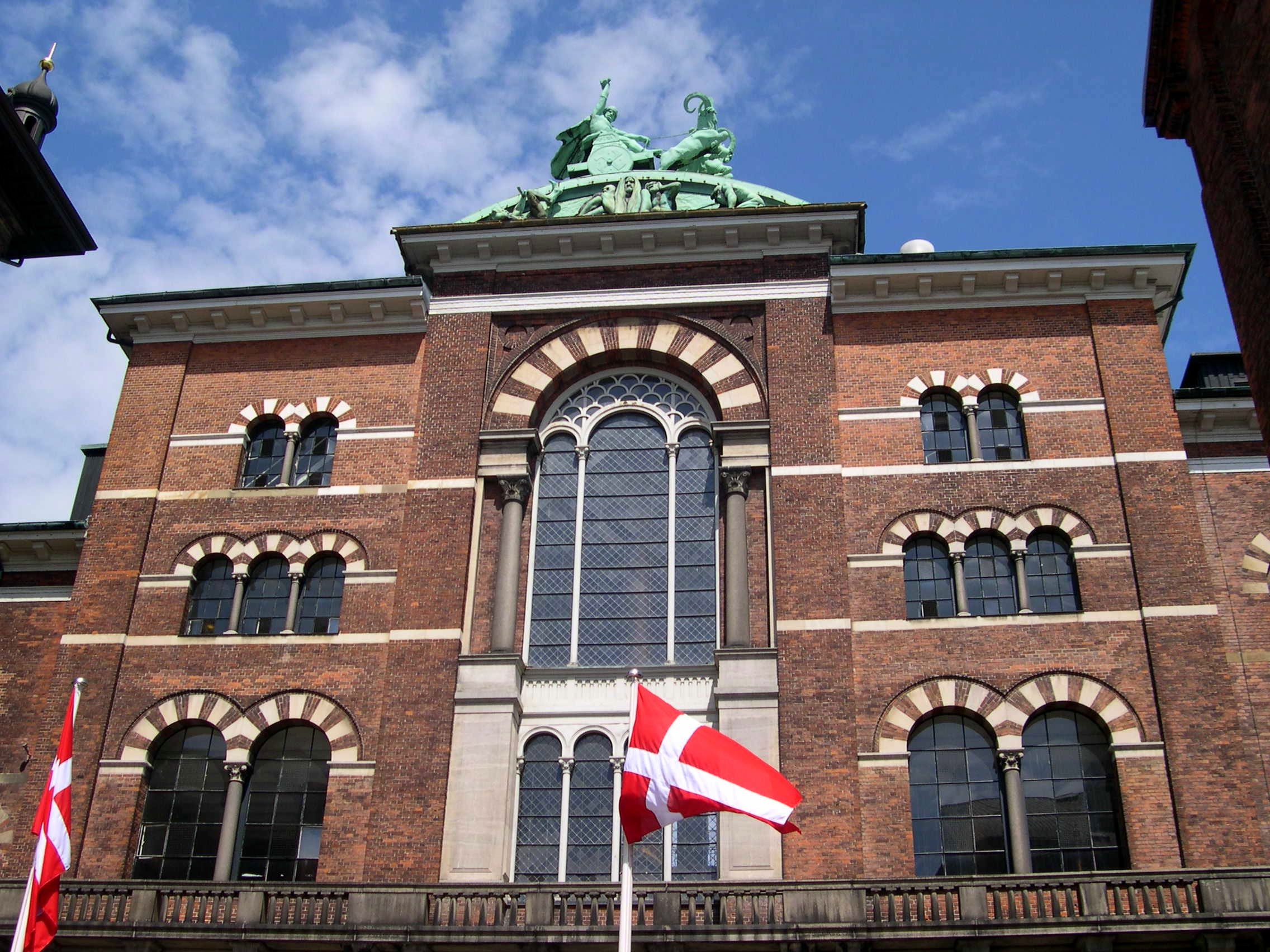 Carlsberg Brewery, Copenhagen. Architects: Vilhelm Klein & Carl Harild, 1901